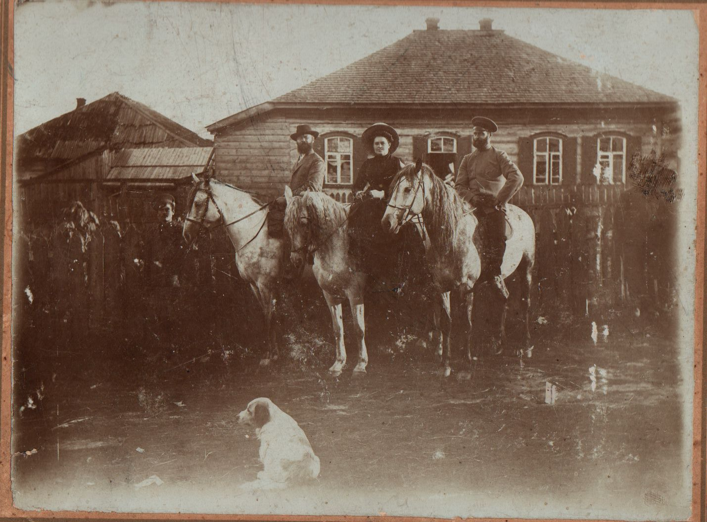 Левковский Владимир Иосифович (слева) с женой Прасковьей и братом Львом Иосифовичом (справа) возле своего дома в с. Годотемля (1916 год)